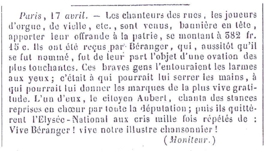 Extrait de la section "Dons patriotiques" du Moniteur du 17 avril 1848.